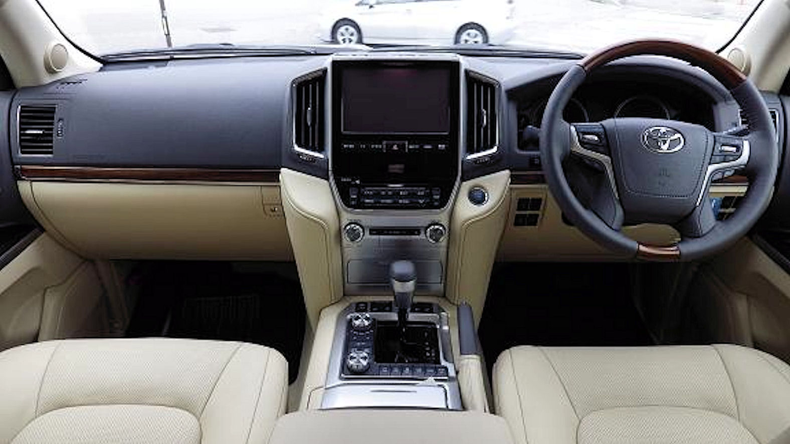 )トヨタ・ランドクルーザー200 ZX（オプション装着車）